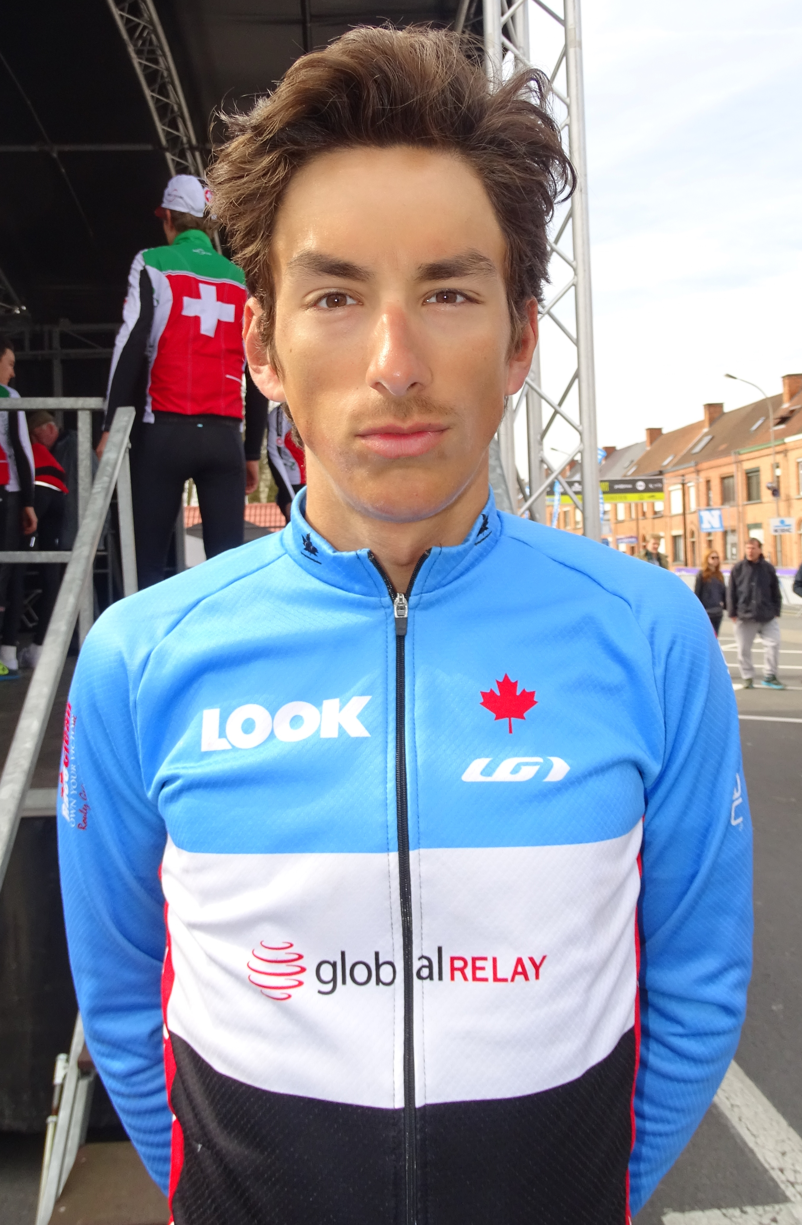 Reportage réalisé le samedi 9 avril à l'occasion du départ et de l'arrivée du Tour des Flandres espoirs 2016 à Audenarde, Belgique.